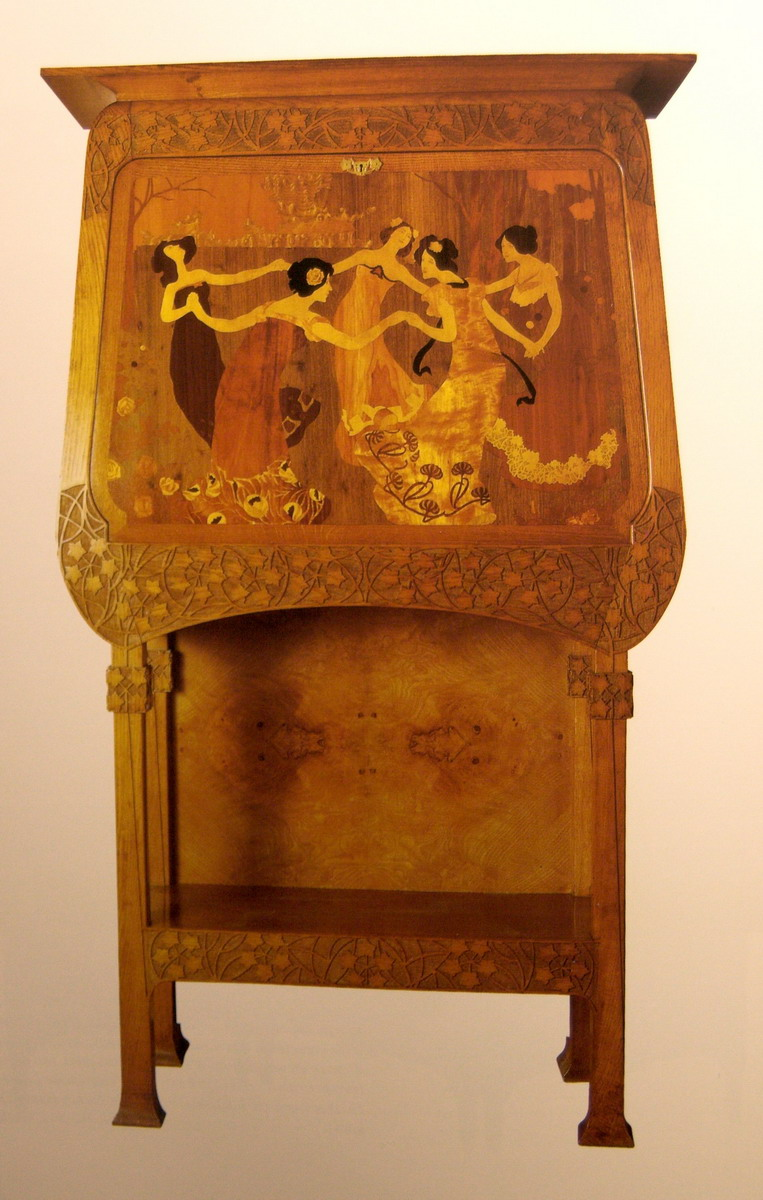 Arqueta modernista amb talla i marqueteria, obra de gaspar Homar (1904).